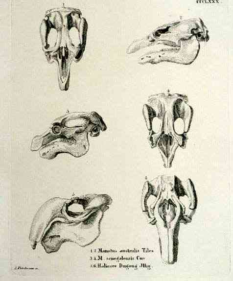 Sirenia Skull-Fragments, Manatus australis tiles, Manatus senegalensis Cuv. Halicore Dugong Illig.